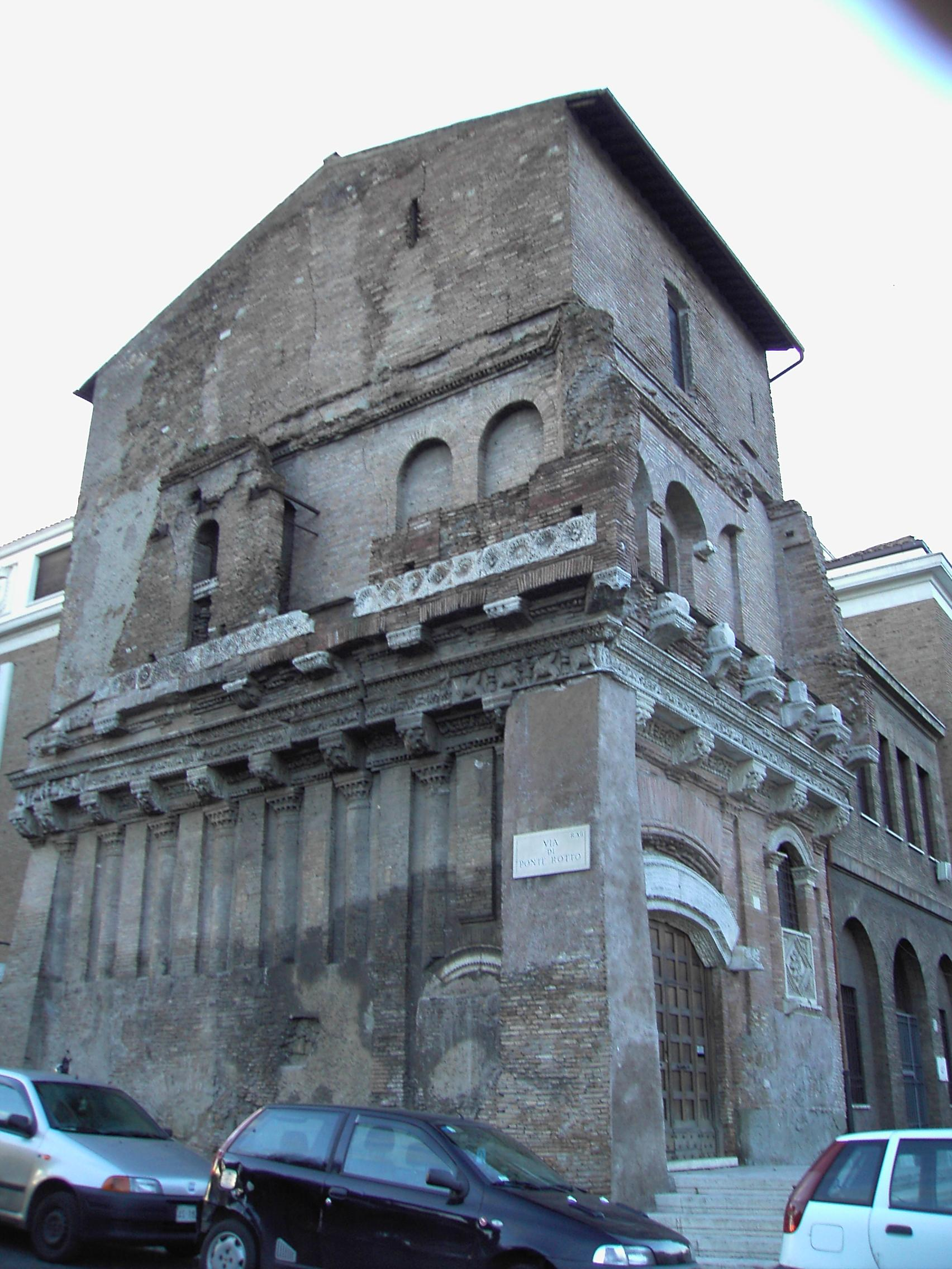 Roma, via di Ponte Rotto: Tor Crescenzia, anche detta Casa di Cola di Rienzo